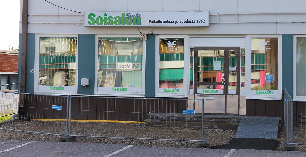 Soisalon lehden, Leppävirralla viikottain (tiistai) ilmestyvän sanomalehden toimitus ja muita toimitiloja Leppävirran keskustassa